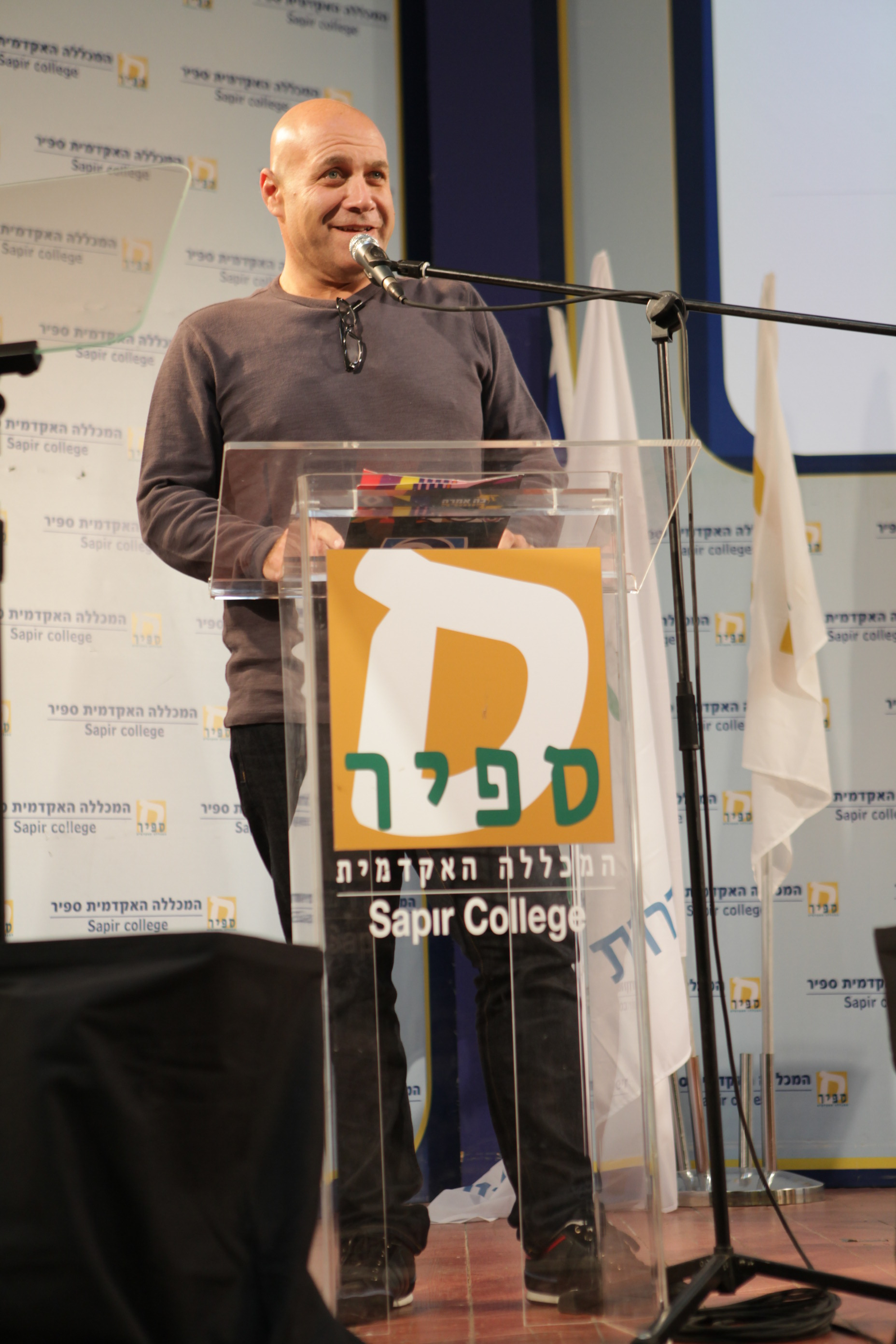 כנס שדרות לחברה במכללה האקדמית ספיר ובעיר שדרות 2015